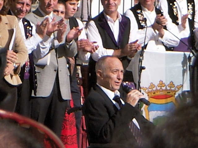 Paquito Fernandez Ochoa